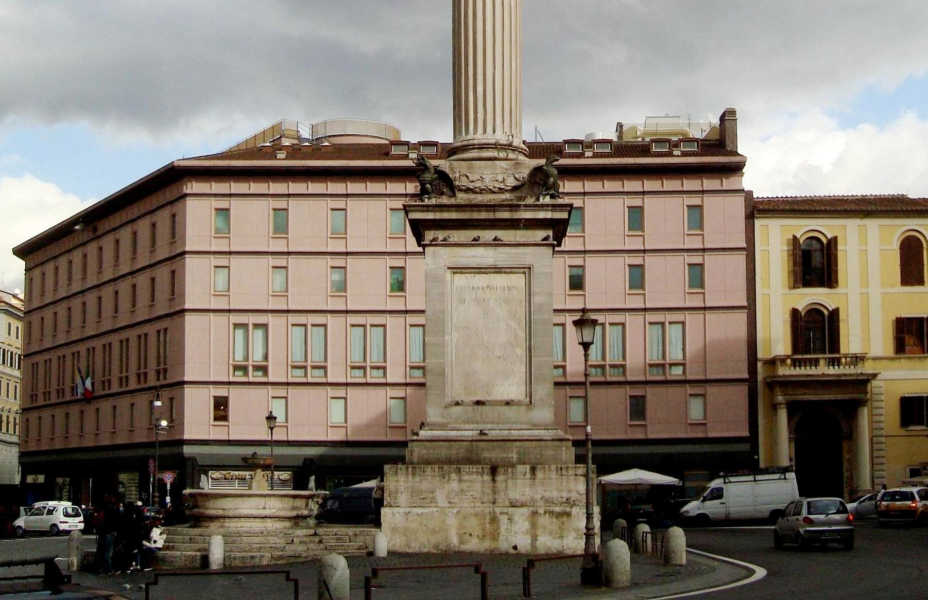 Pontificio Seminario Lombardo, Piazza di Santa Maria Maggiore, Roma